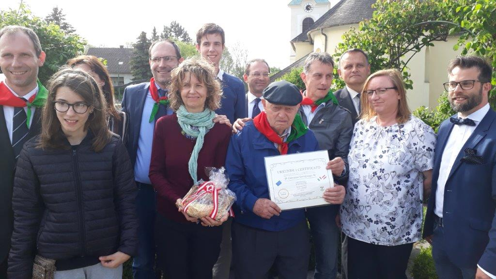 Der Italiener Giovanni Savegnano, * 1924, jahrelang im Kriegsgefangenenlager Kaisersteinbruch, besucht mit seiner Familie Kaisersteinbruch. Gemeinde Bruckneudorf-Kaisersteinbruch und Museums- und Kulturverein veranstalten ein Fest.